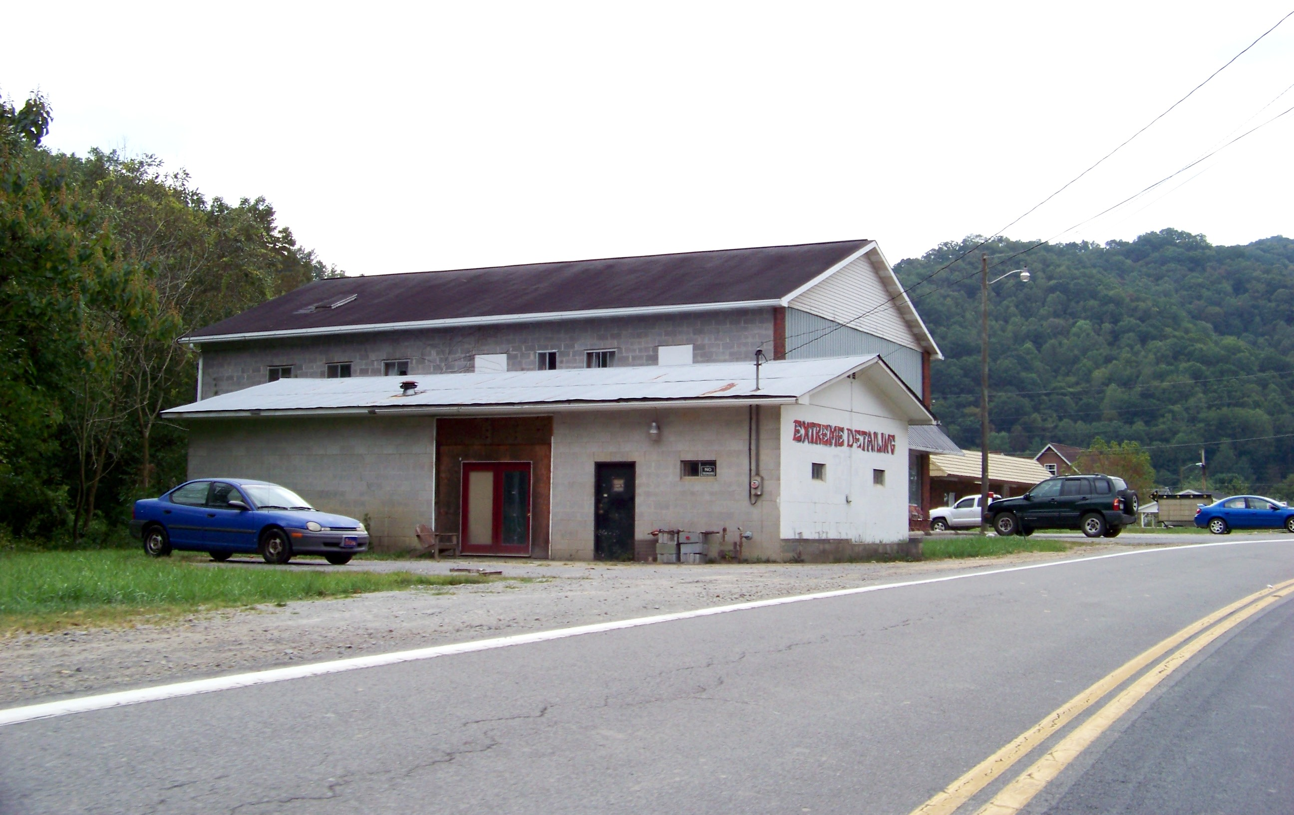 3, WV, USA